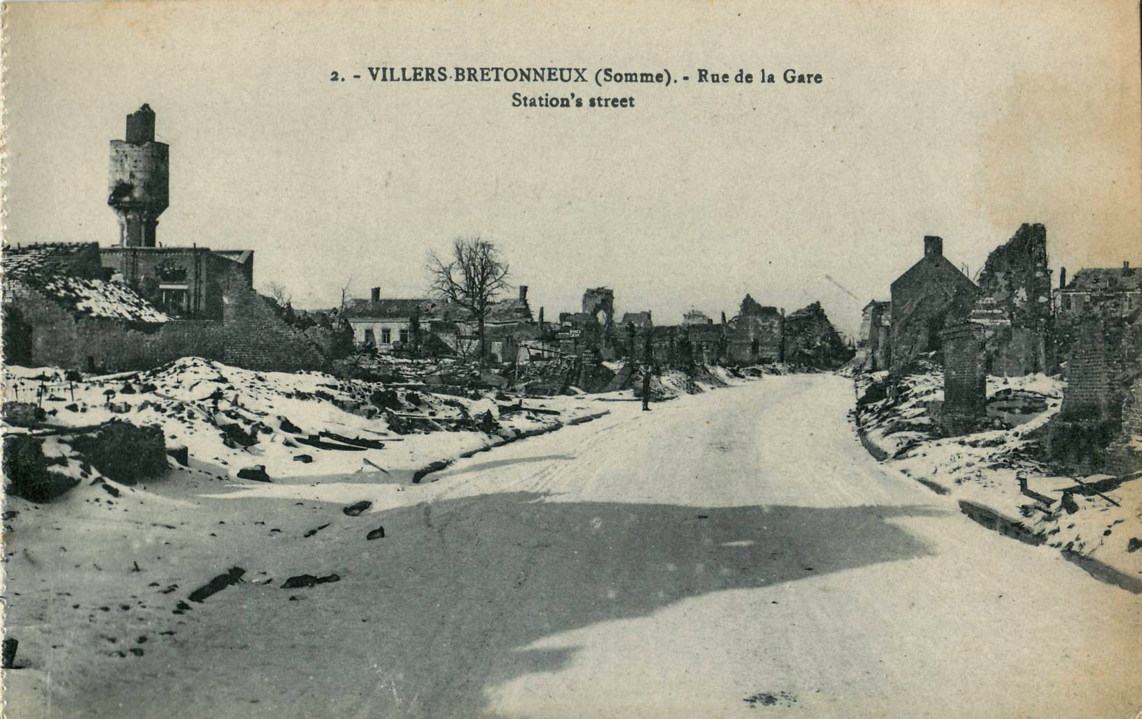 Carte postale ancienne sans mention d'éditeur : VILLERS-BRETONNEUX - Rue de la Gare